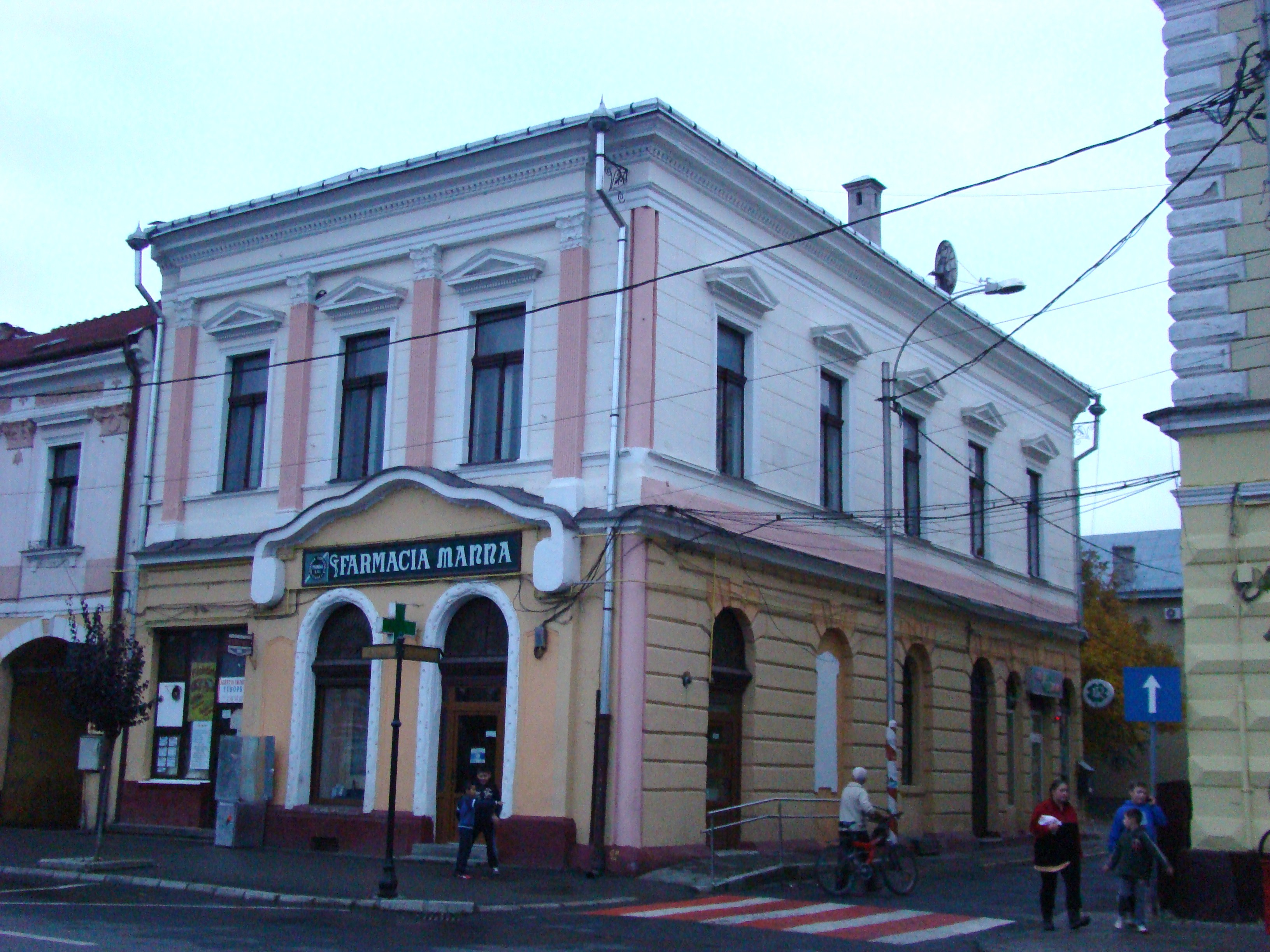 Farmacia Nagy, municipiul Sighetu Marmației, Piața Libertății 7